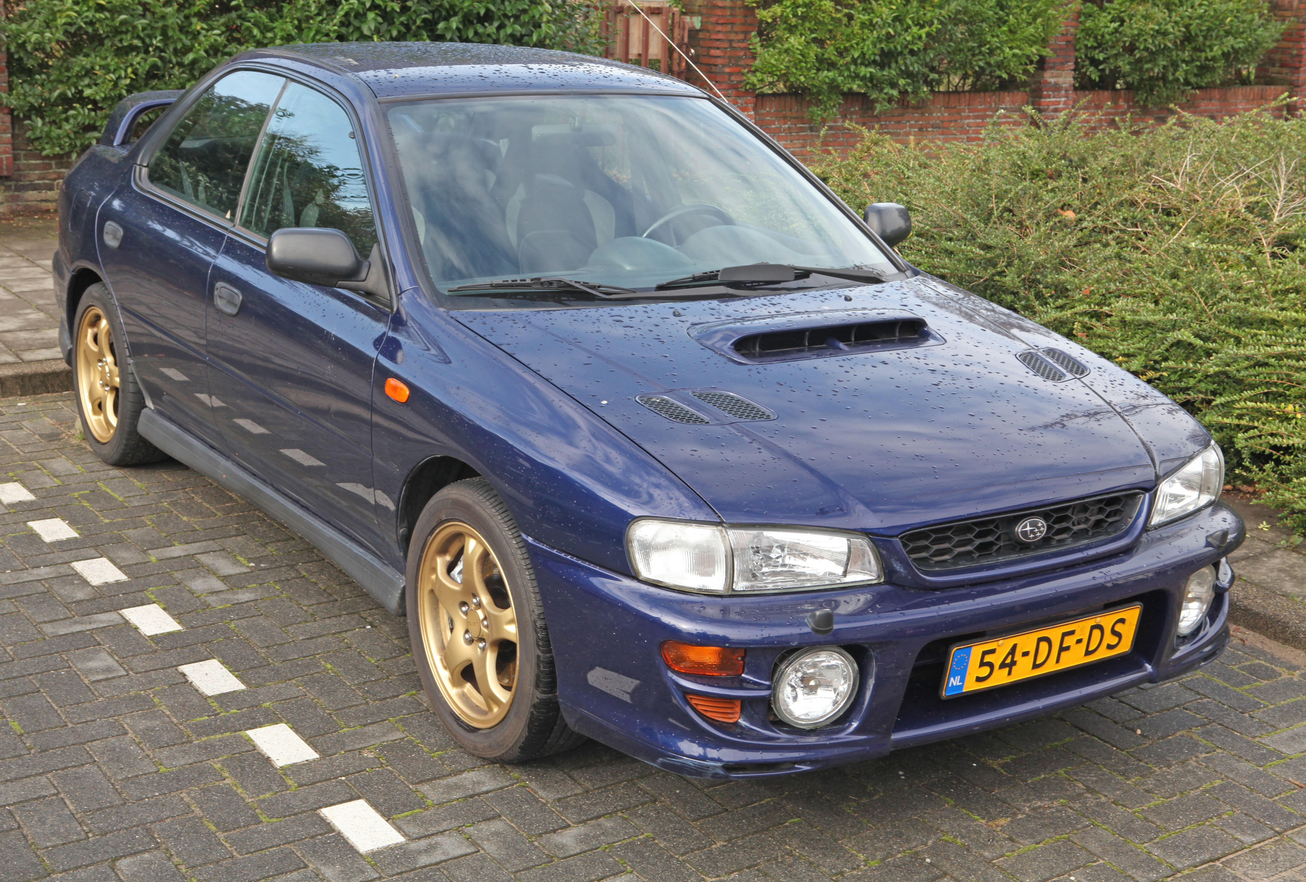 1999 Subaru Impreza GT Turbo AWD